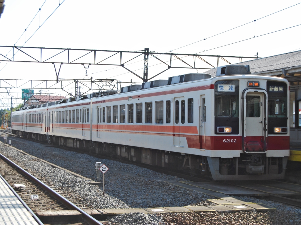 野岩鉄道6050系電車100番台62102編成他4両（2008/10/27・下今市にて撮影）